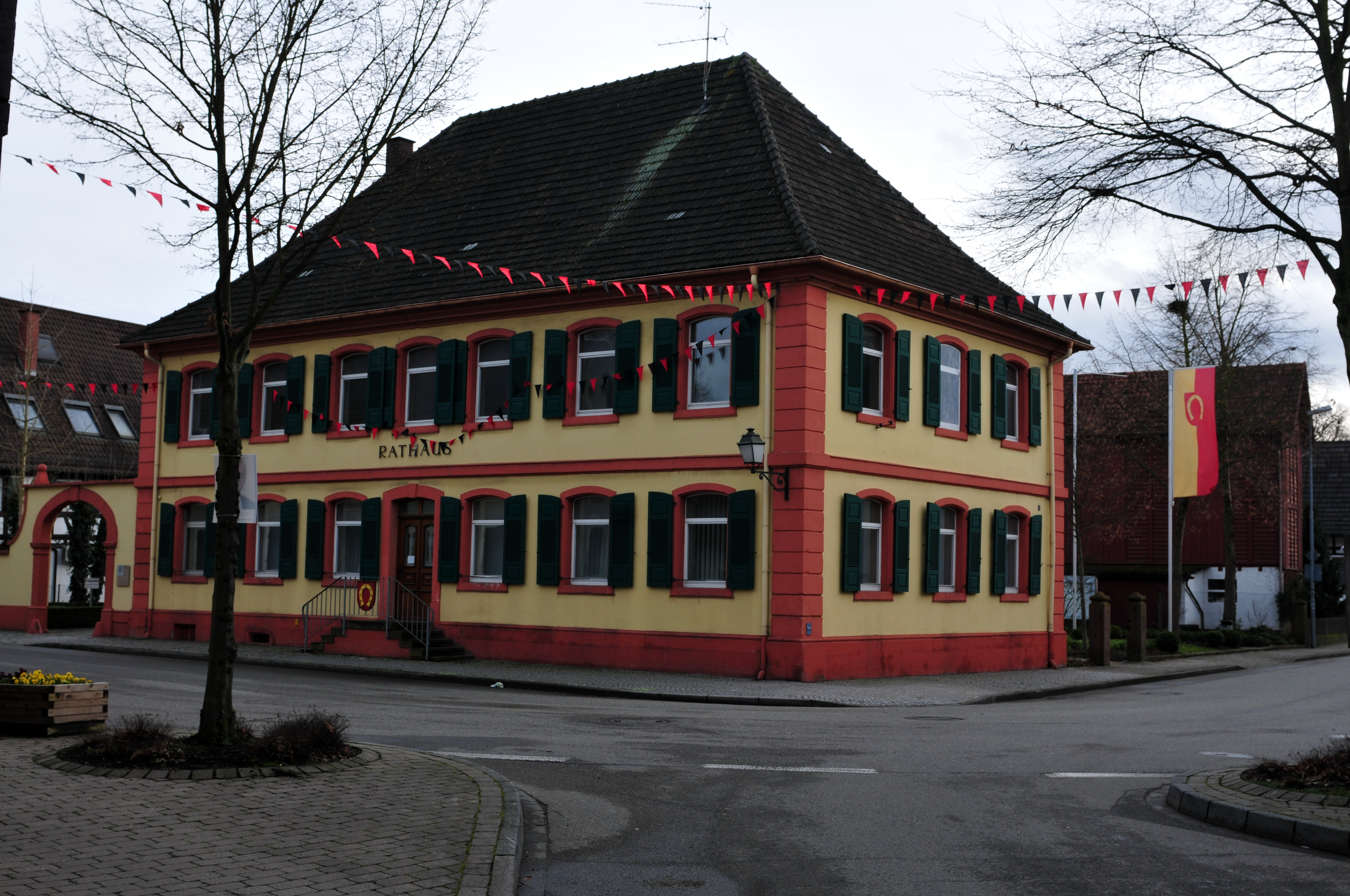 Kork European Parliament 2014 3.–7. February 2014, StrasbourgThis photo has been created within the project "WIKI loves parliaments / European Parliament". Usage and Help If you have any questions concerning this picture or how to use it, feel free to